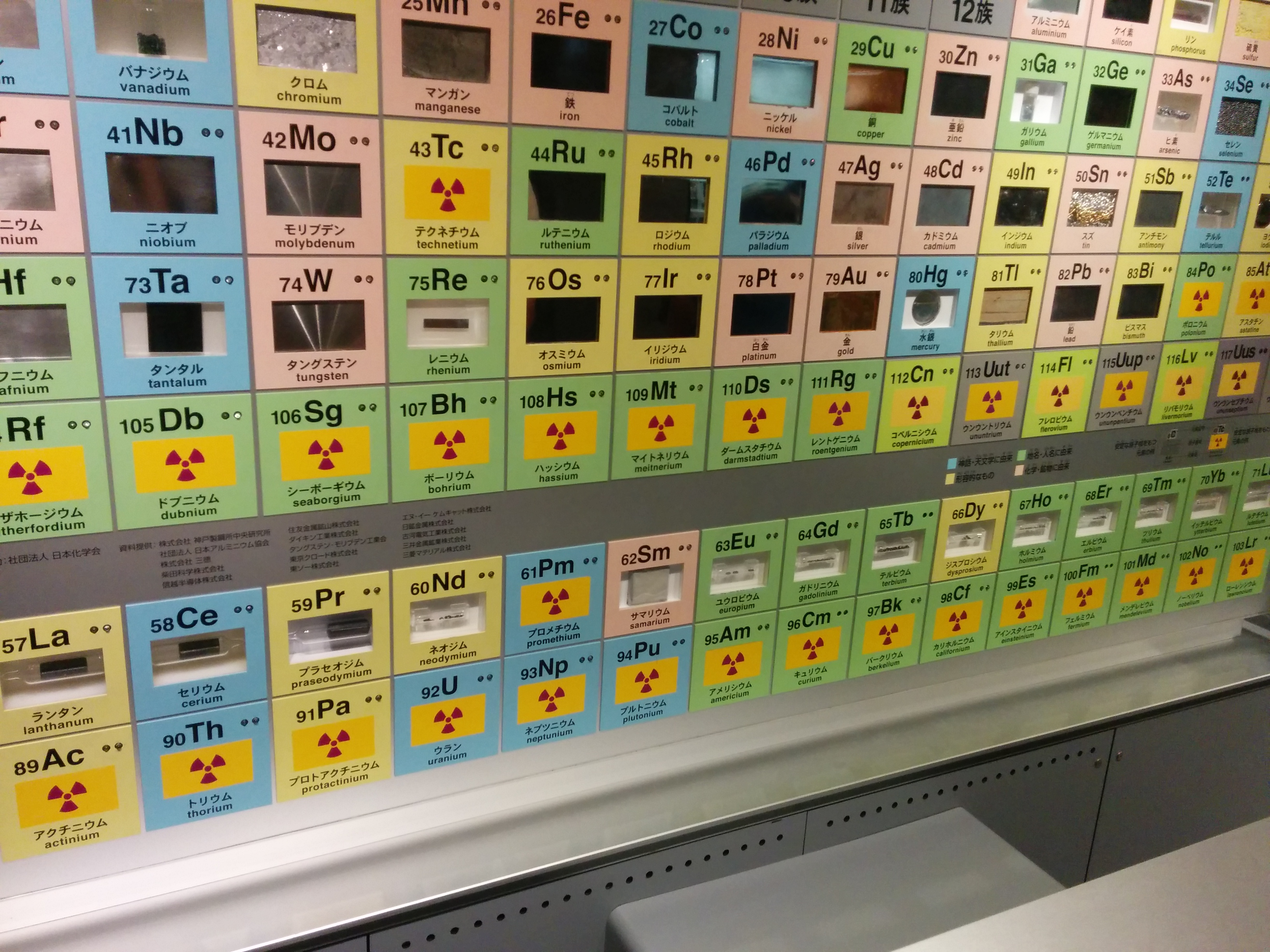 実物周期表 国立科学博物館